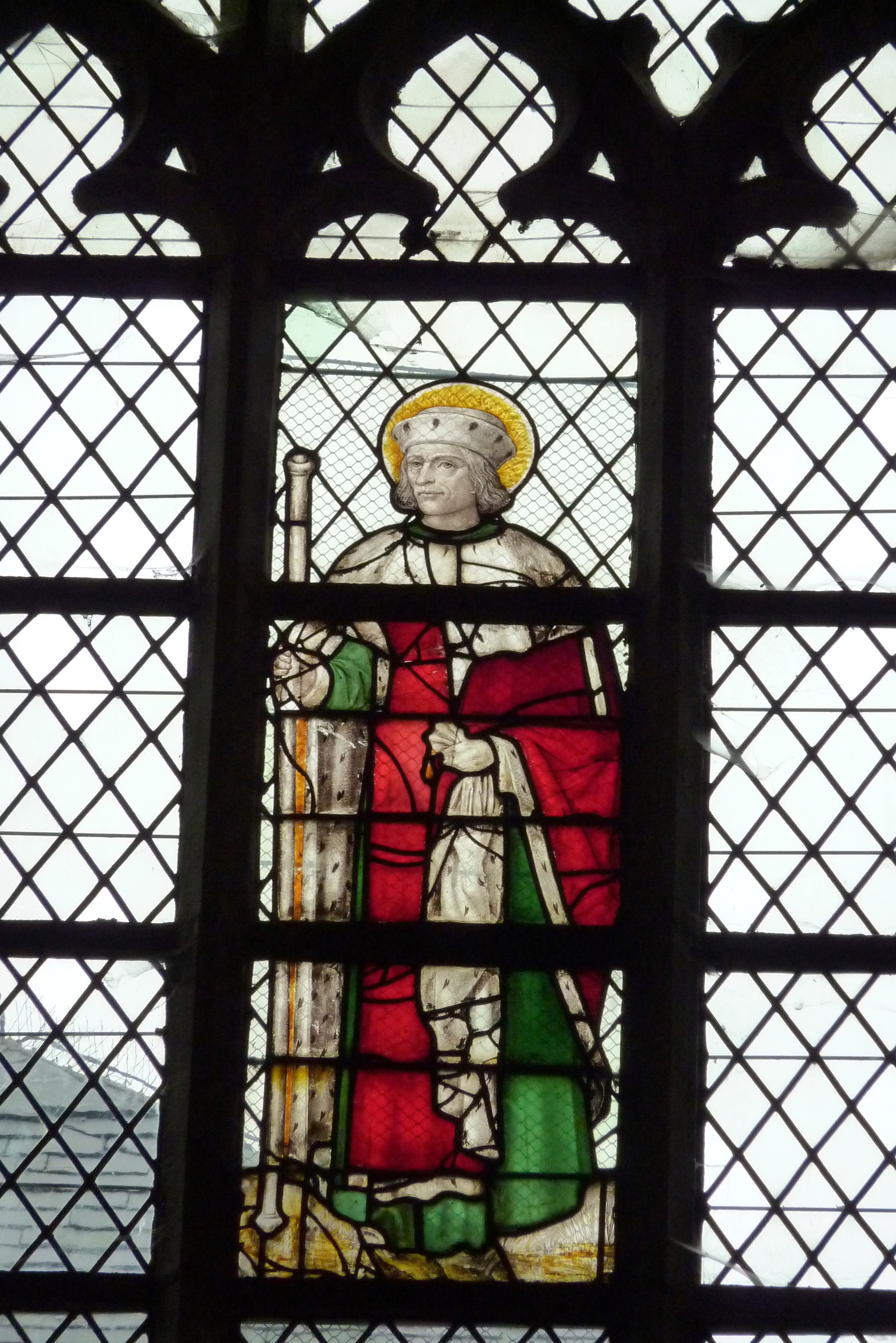 Bleiglasfenster in der St. Gummaruskirche in Lier in der Provinz Antwerpen (Belgien), Fragment eines Fensters von Jan van Immersele, um 1476; Darstellung: hl. Gummarus